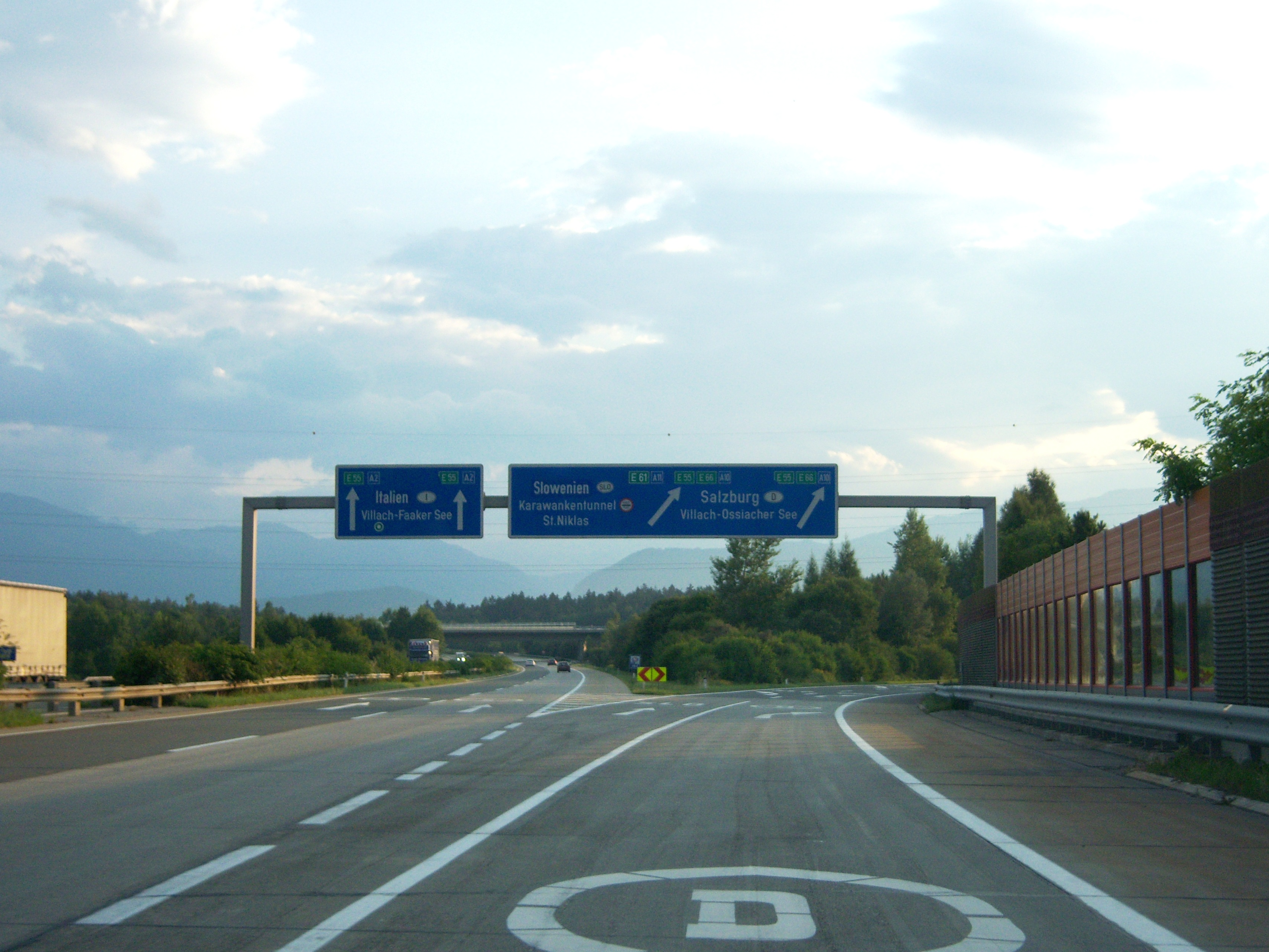 Süd Autobahn A2 Richtung Italien im Bereich des Knoten Villach